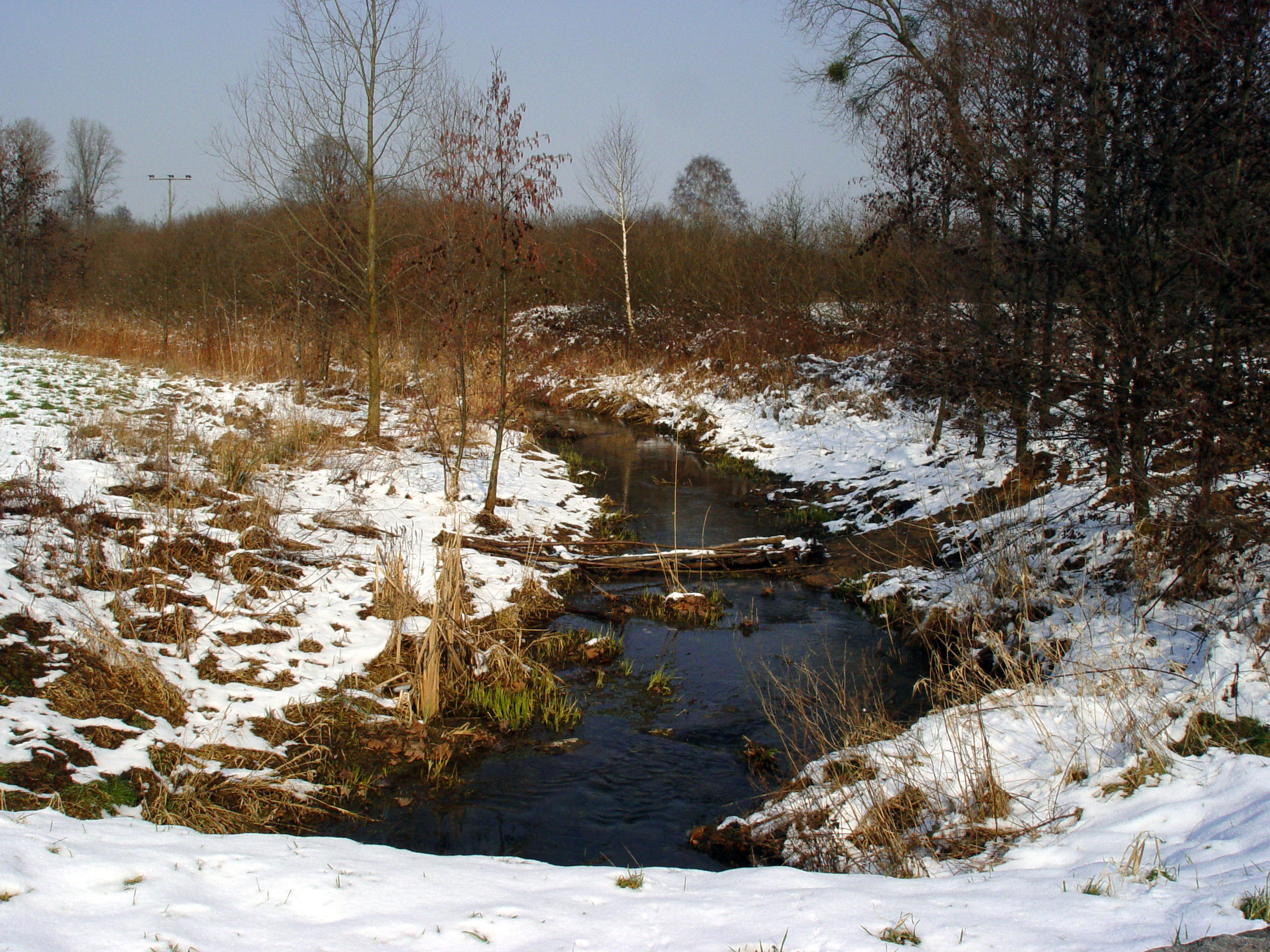 Der Federbach in Bietigheim. Fotografiert von Martin Dürrschnabel.